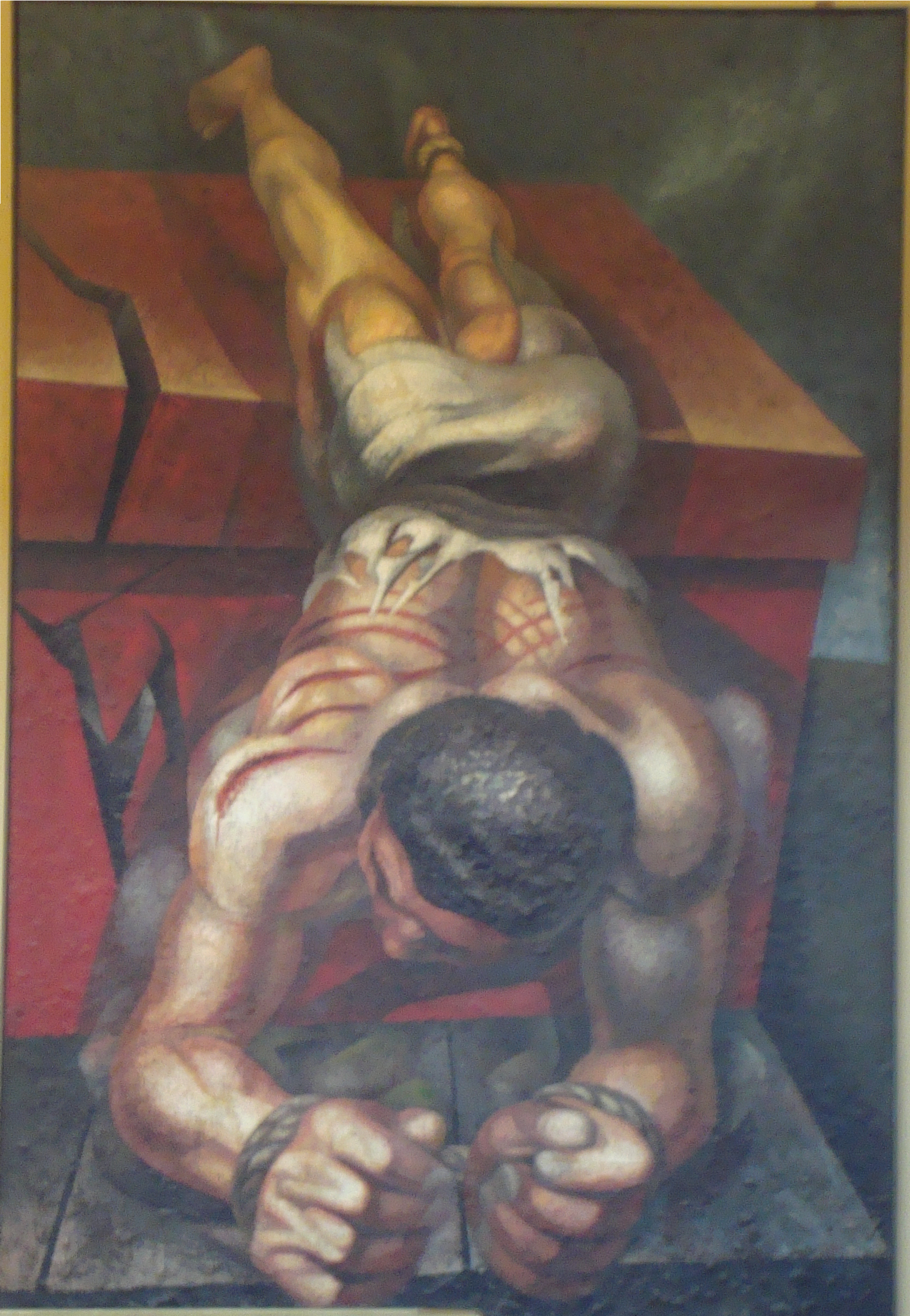 Victima del Fascismo,1945 Piroxilia sobre celotex y masonite, recubierto con plástico sintético 3.68 x 2.46 m^2